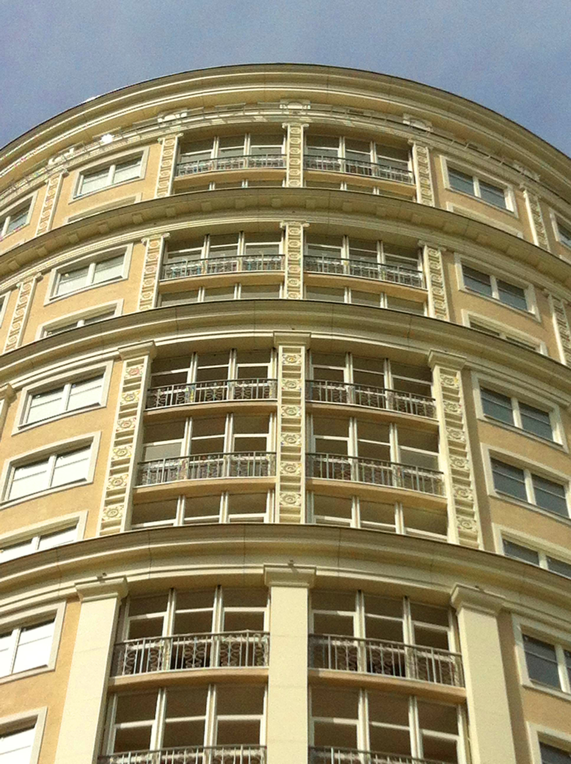 Жилой комплекс «Английский квартал»